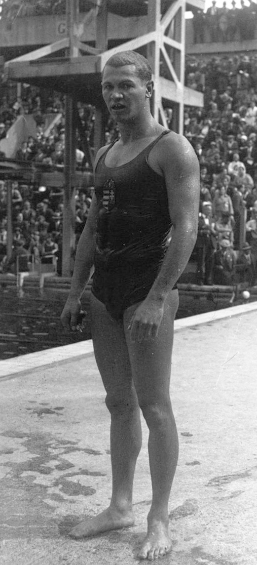 Les Tourelles : Championnats d'Europe : M. Szekely (Hongrie) : [photographie de presse] / Agence Meurisse